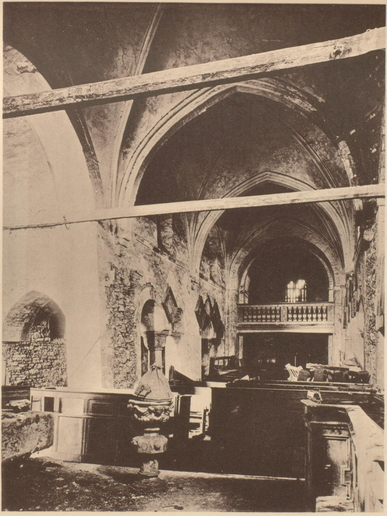 Die Georgskirche von Innen mit dem noch vorhandenen Gewölbe aus dem 14. Jahrhundert im Jahre 1893.